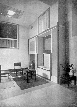 Anoniem. Fotografisch atelier Berssenbrugge in Den Haag. 1921. Foto. Afkomstig uit De Stijl, 5e jaargang, nummer 1 (januari 1922). De fotograaf is onbekend, dus volgens art. 38 van de Nederlandse Auteurswet, is het auteursrecht verstreken op 1-1-1993.